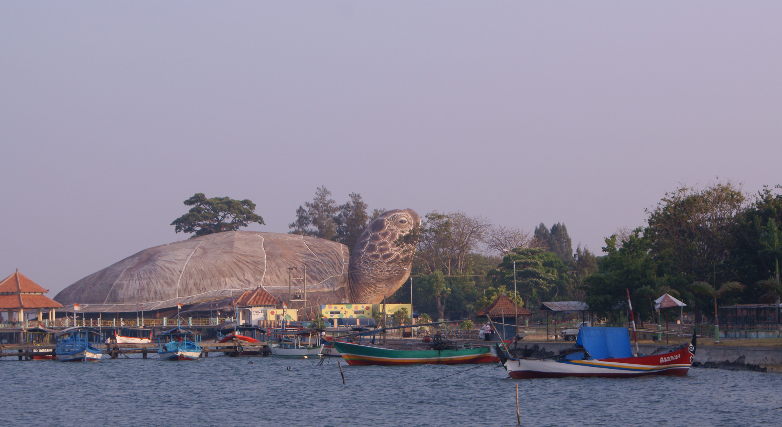 Pantai Kartini, Kota Jepara